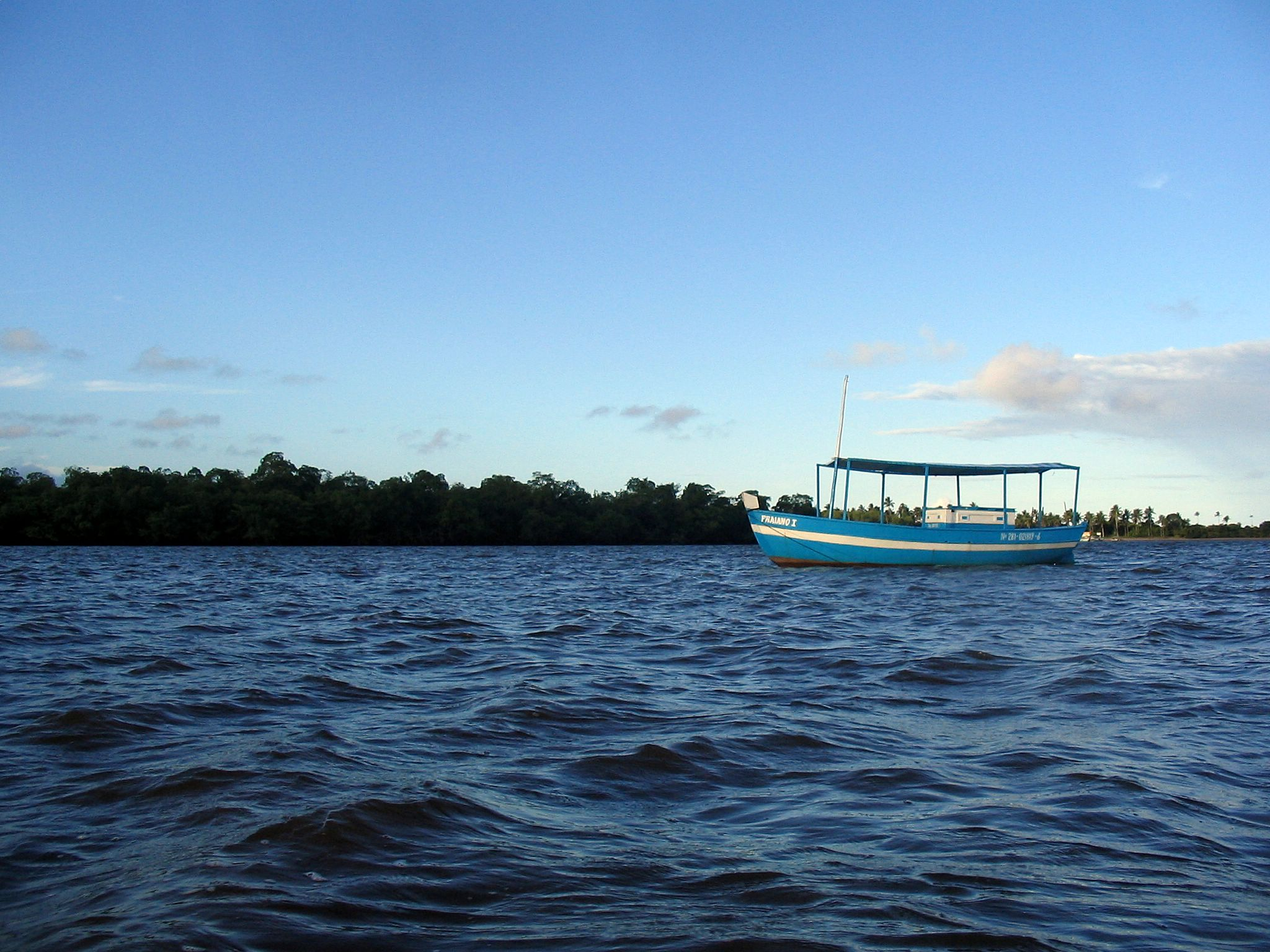 Foto tirada em 2005 de um barco que navegava no rio das Contas, no município de Itacaré, Bahia, Brasil.